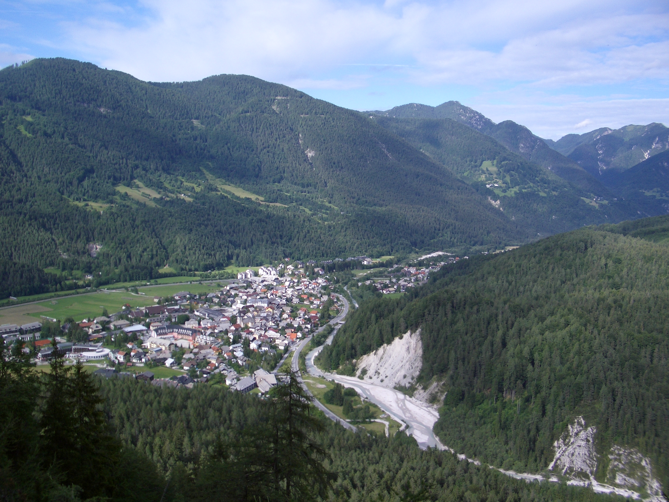 Kranjska Gora from mountain "Vitranc"